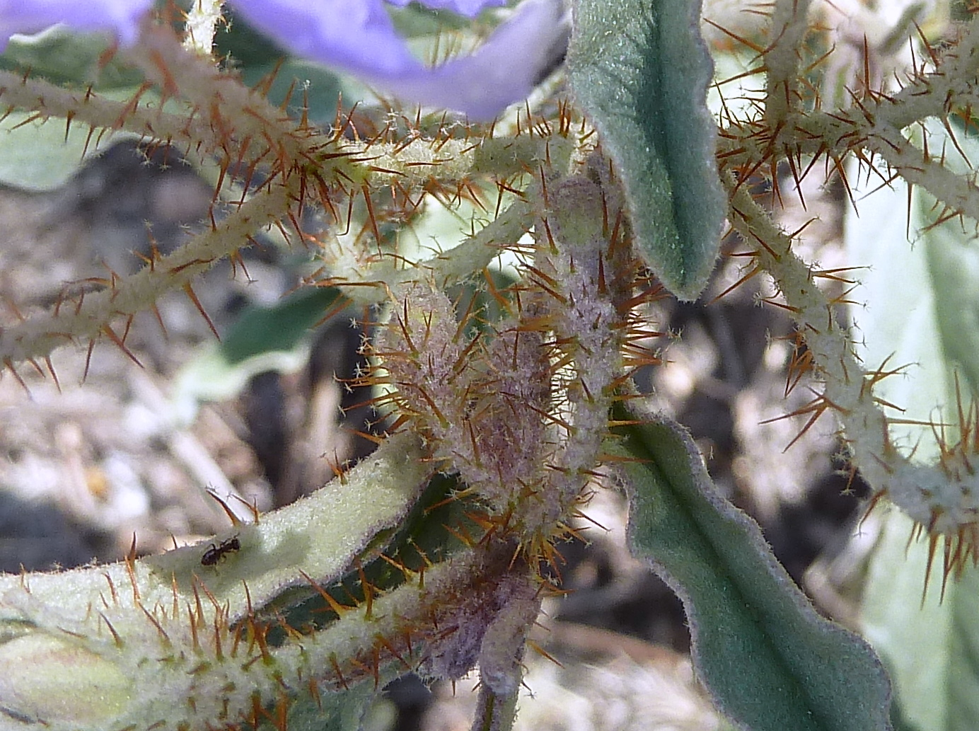 Solanum elaeagnifolium (Solano de hoja de paraíso) - detalle de las espinas superiores (peciolos y nervios medios de las hojas, tallos, pedúnculos florales y cálices) - la hormiga a la izda da la escala - Parque del Planetario, Madrid Capital (España).